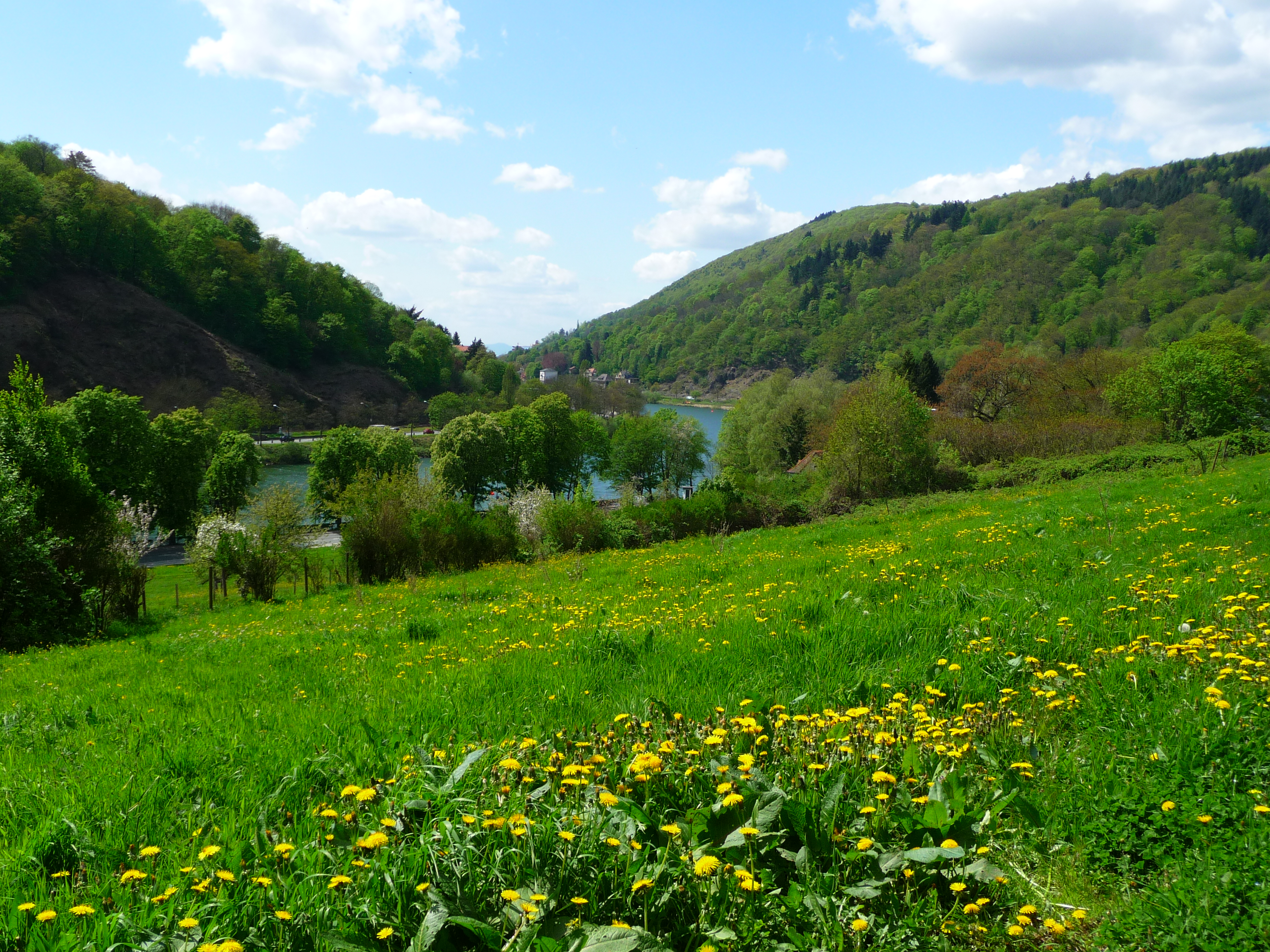 von Ziegelhausen Richtung Heidelberg Innenstadt (Baden-Württemberg, Deutschland)